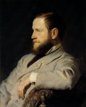 Podobizna Josefa Šebastiána Daubka od Fr.Ženíška